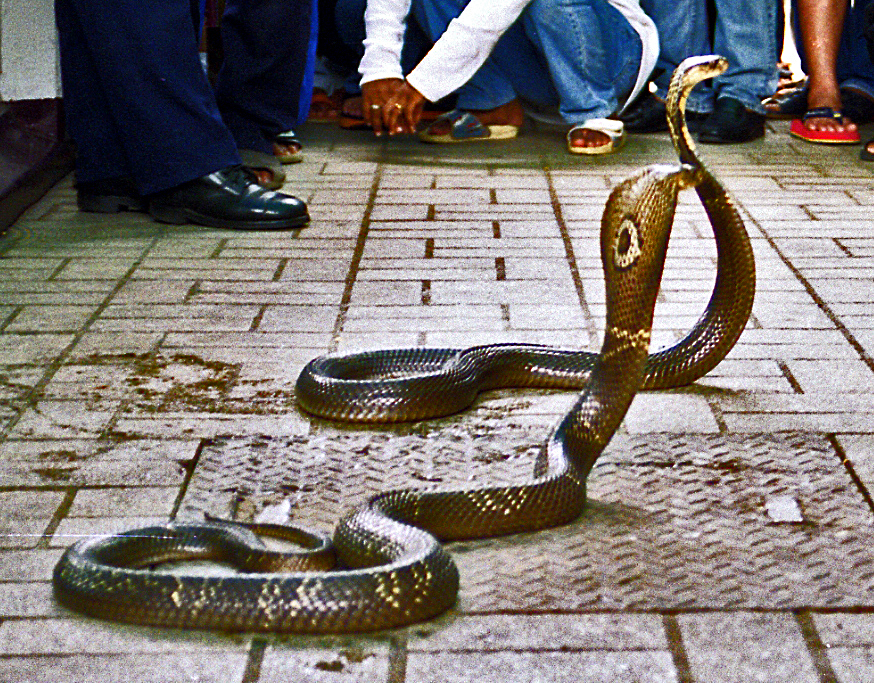 Naja kaouthia at the Snake Farm in Bangkok